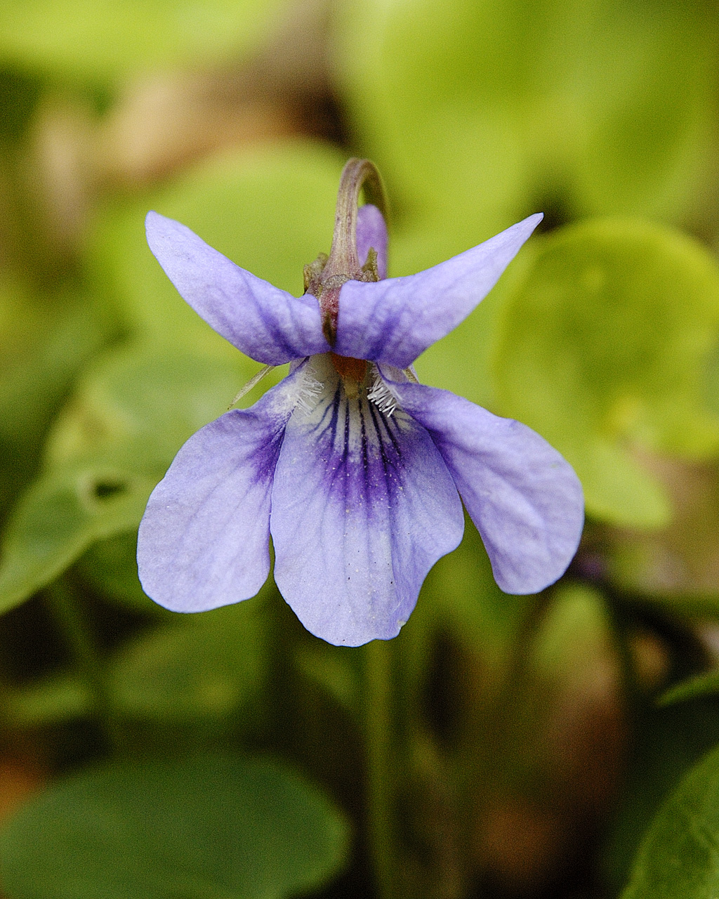 Veilchen; Es dürfte sich um ein Wald-Veilchen (Viola reichenbachiana) handeln. --Franz Xaver 20:43, 6. Mär 2006 (CET); Hundsveilchen, fotografiert in Südniedersachsen